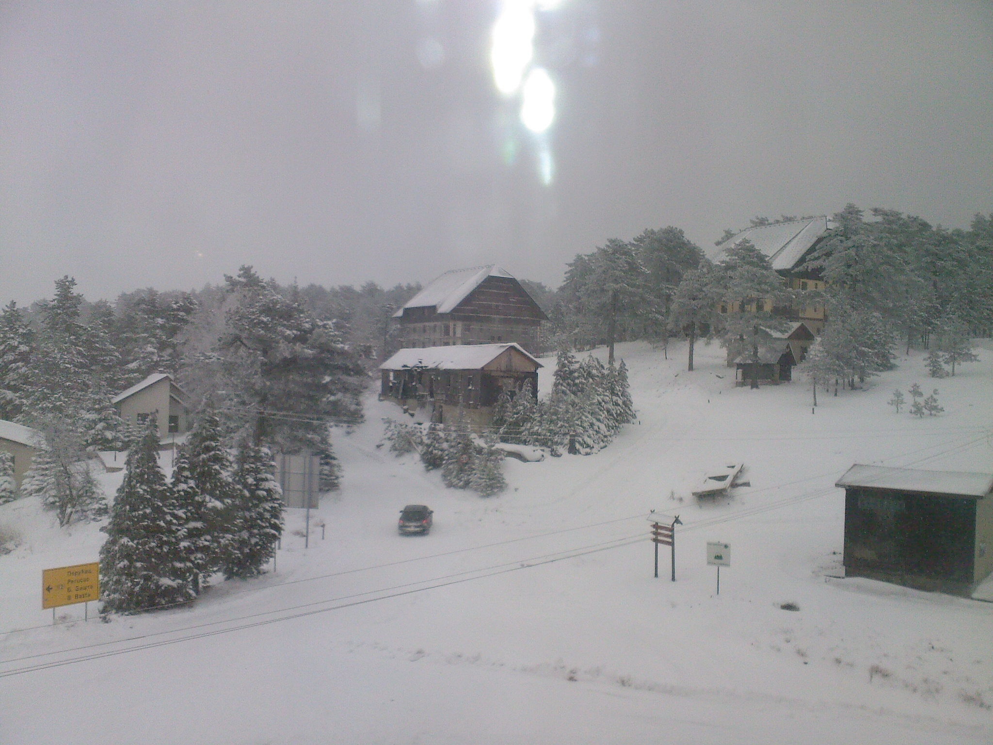 Jagoštica 31256, Serbia